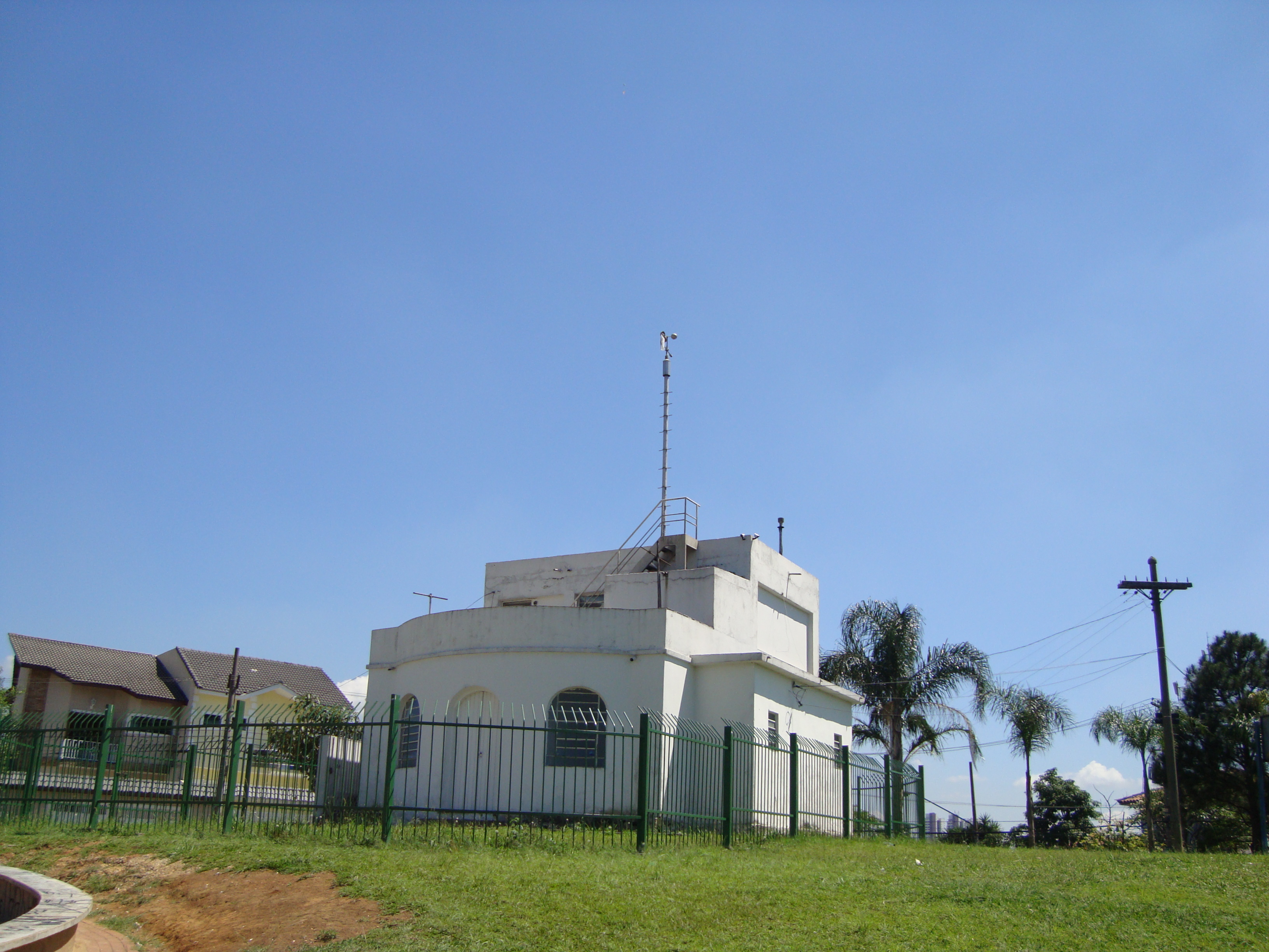 Foto do Mirante de Santana, localizado no Jardim São Paulo, zona norte da cidade de São Paulo